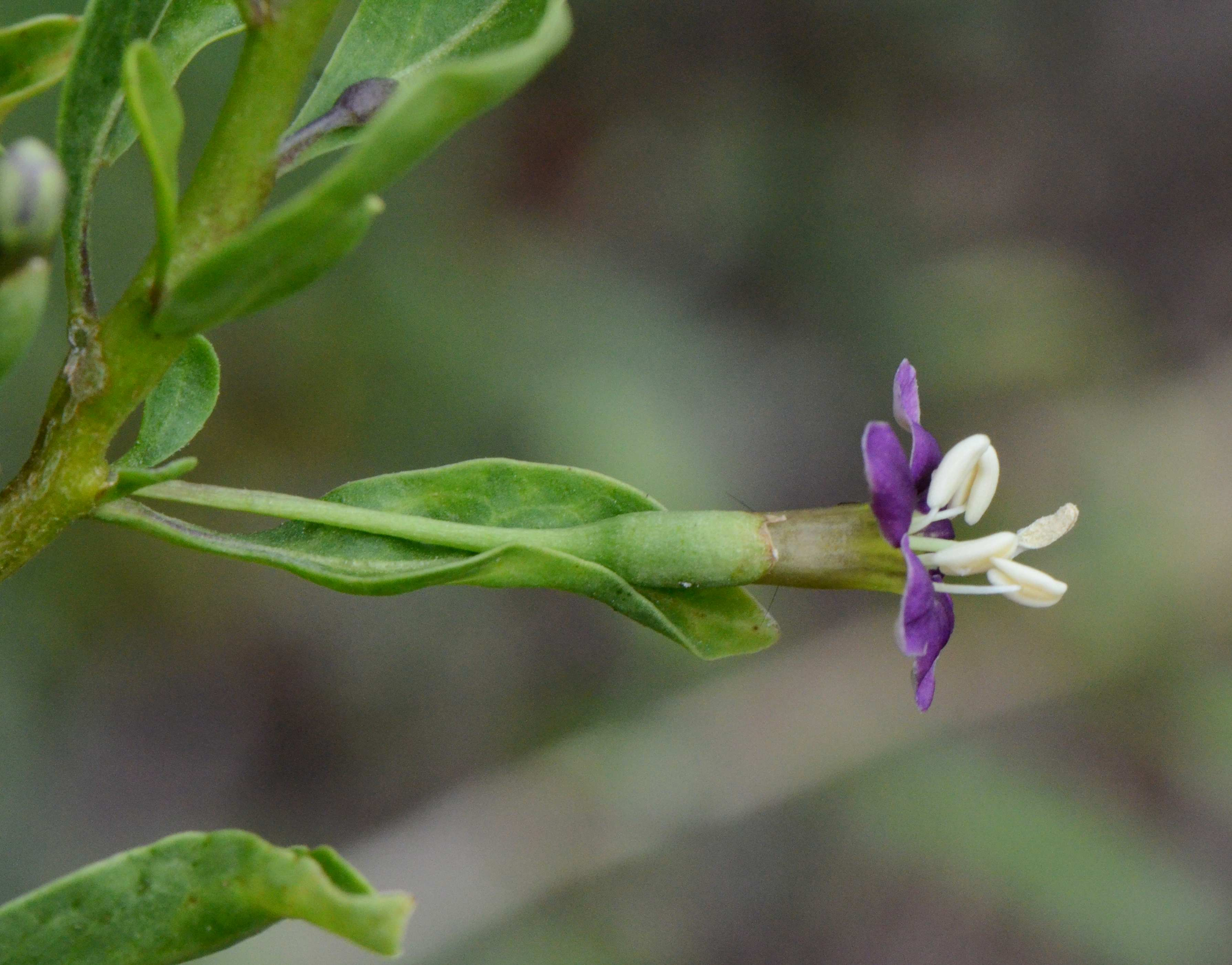 Lycium barbarum, fleur, Jardin des Plantes, Paris, calice à 2 lobes, tube de la corolle 10 mm, lobes 6mm